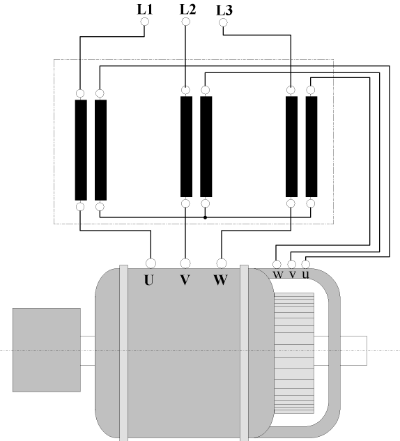 Prinzipschaltbild Drehstrom-Kollektormotor mit Hauptschlussverhalten